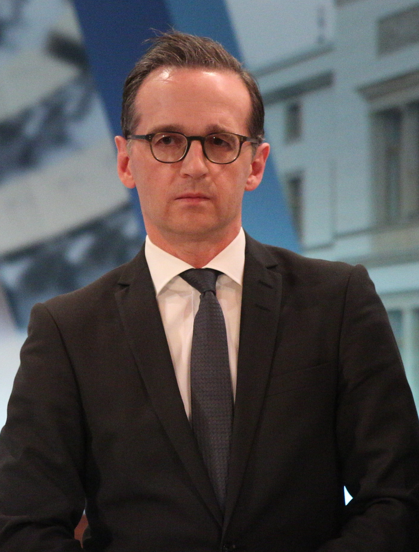 Heiko Maas (SPD; Bundesminister für Justiz und Verbraucherschutz) beim Wahlabend zur Landtagswahl im Saarland